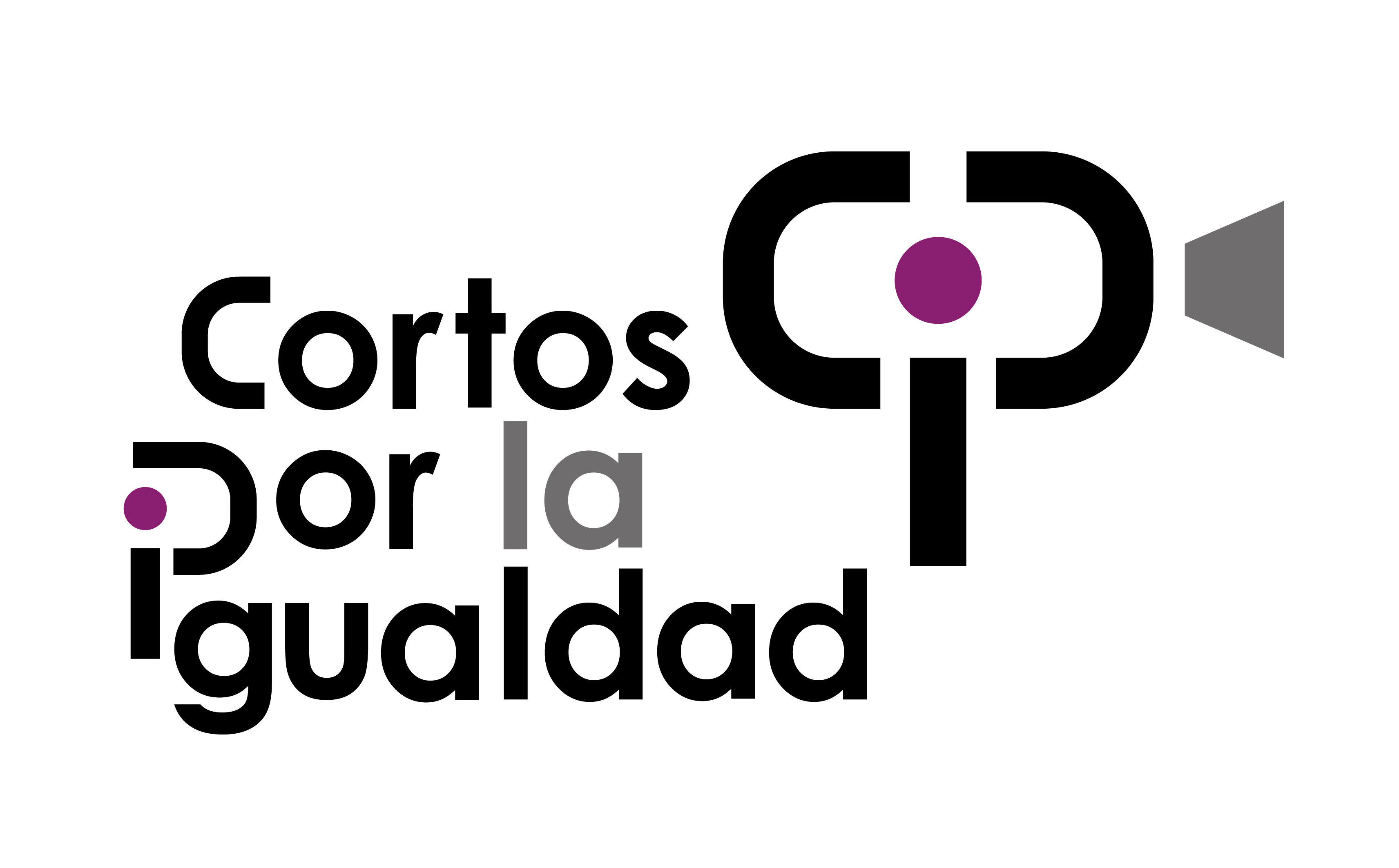 Cortometrajes seleccionados y relacionados con la discriminación de la mujer.